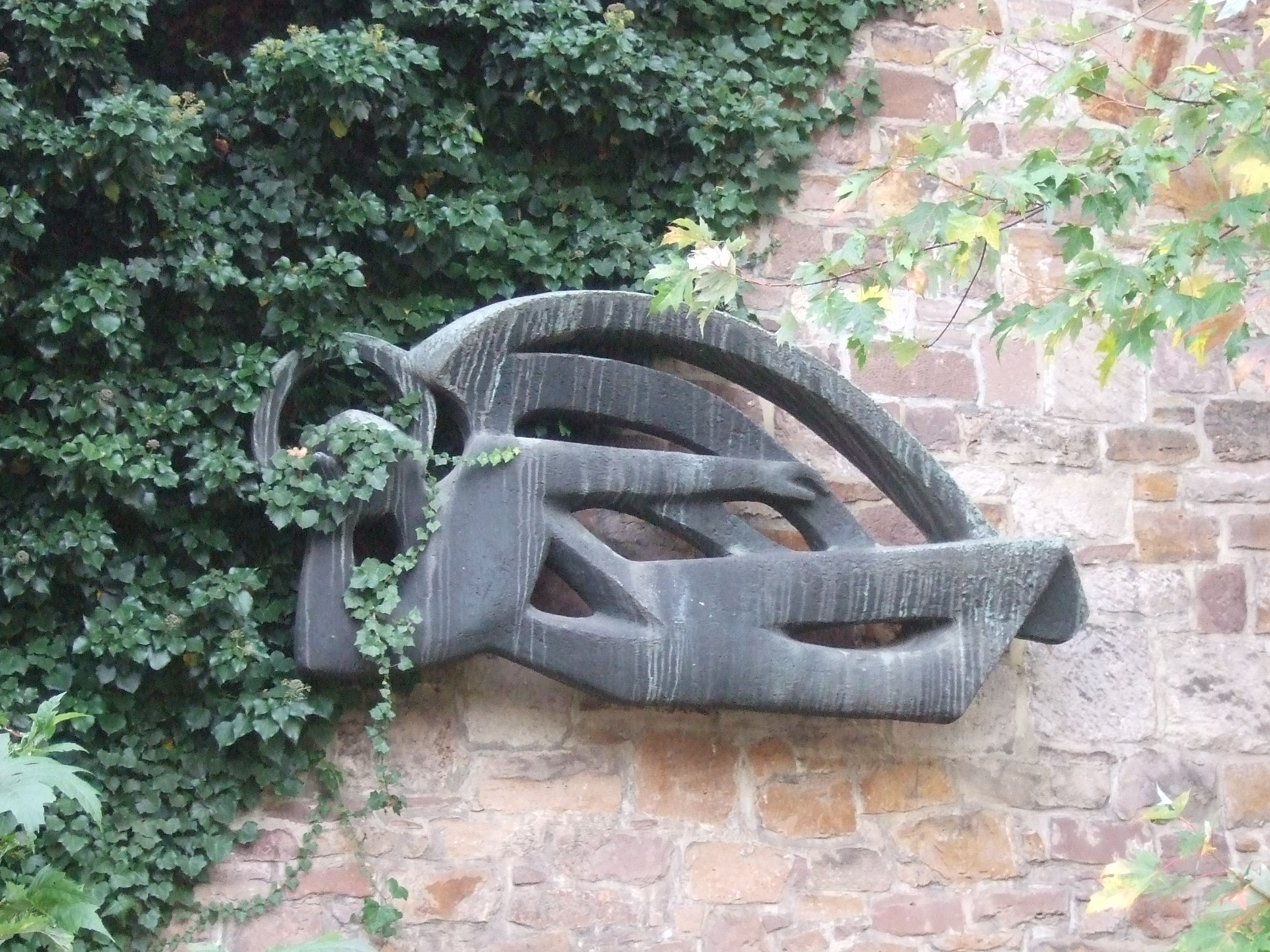 Mahnender Engel - Alte Brüderkirche Kassel